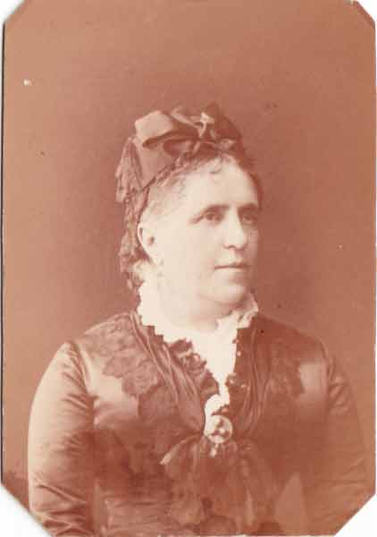 Любовь Ивановна. урождённая Жижиленко, будучи замужем за писателем В. Р. Зотовым, встретила и полюбила В. М. Лазаревского во второй половине 1850-х годов. Зотов развода не дал, и она ушла от него к Лазаревскому с младенцем Надей (Адей) на руках.